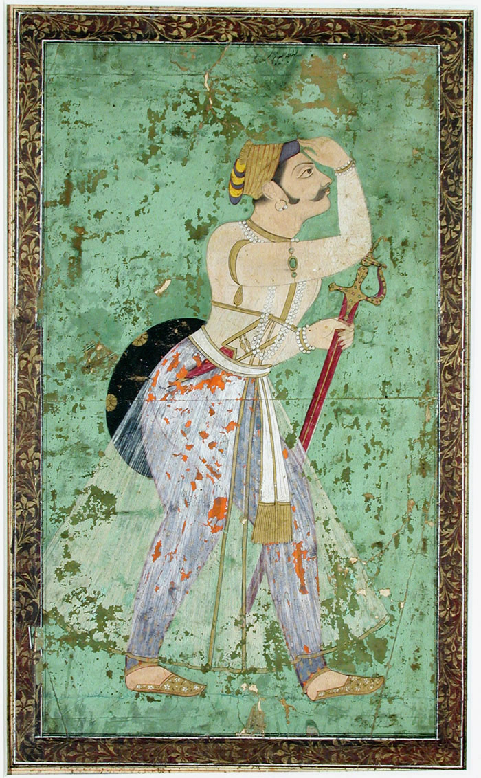 Karan Singh, Maharana of Mewar.